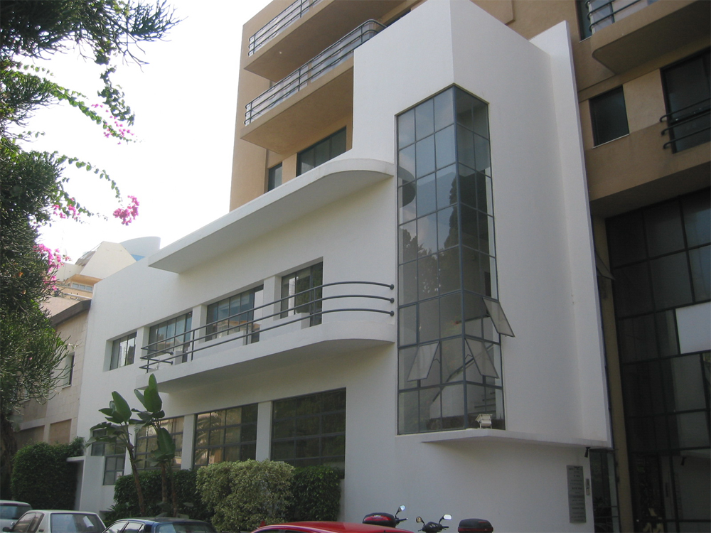 Beit dfus "Ha'aretz" on Maz"e Street, Tel Aviv.